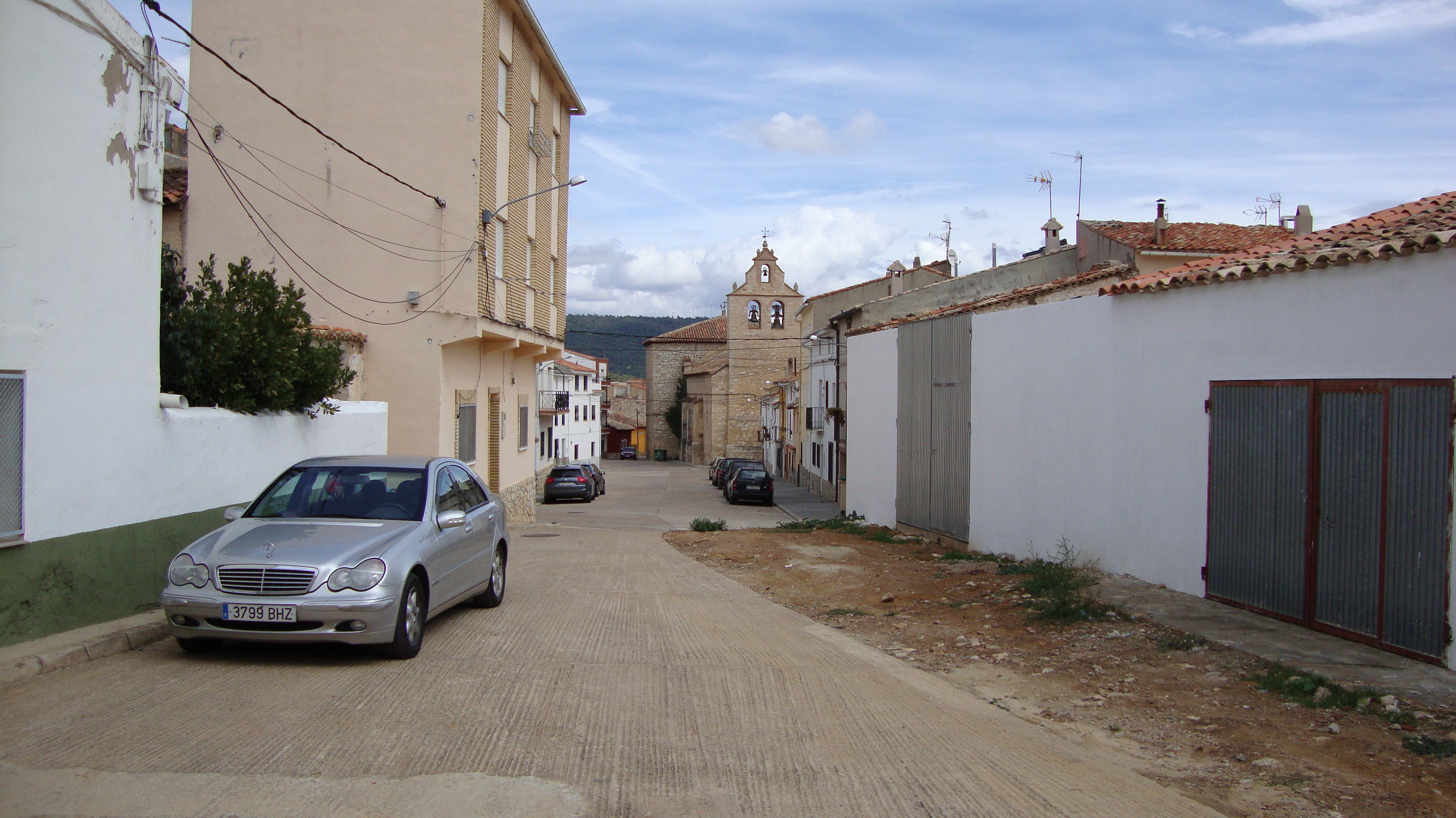 Calle real Talayuelas